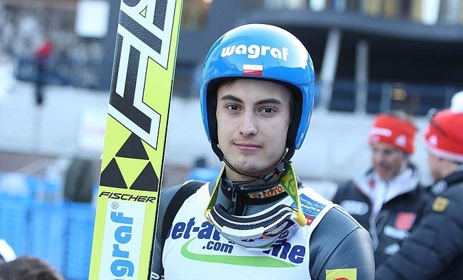 Oficjalne treningi mężczyzn na skoczni K-120 przed konkursem indywidualnym mężczyzn podczas Mistrzostw Świata w Narciarstwie Klasycznym 2013